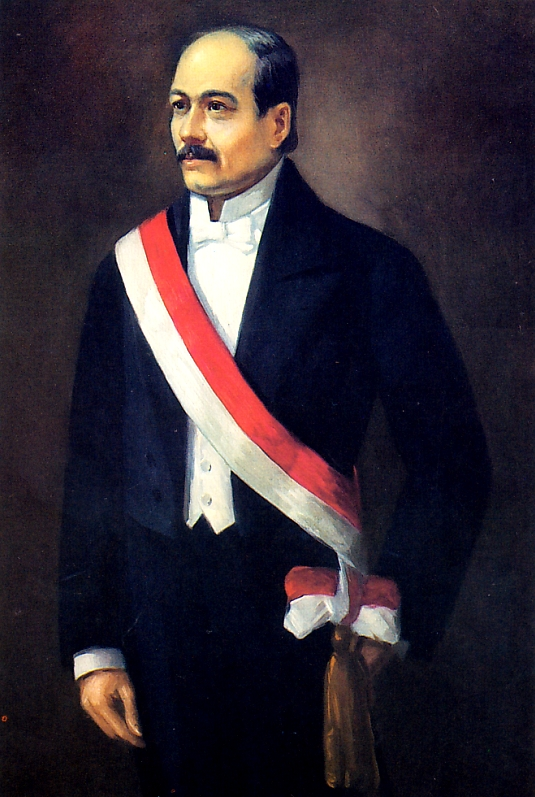 Domingo Elías Carbajo